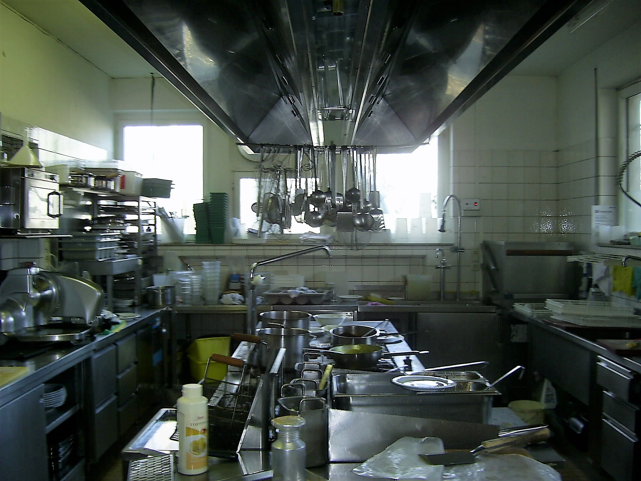 Restaurantküche (Schoch, Mainhardt)